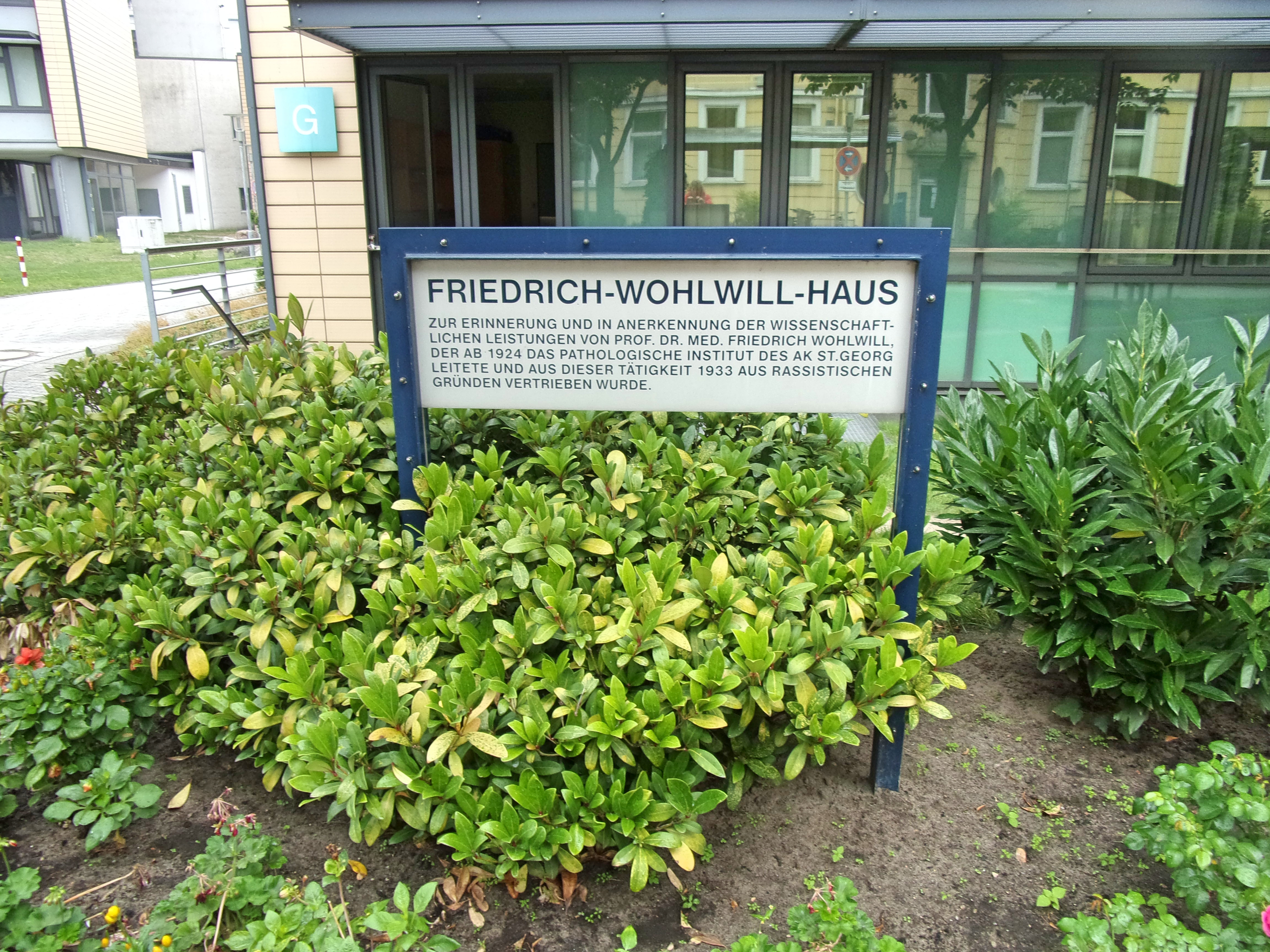 Tafel vor dem Friedrich-Wohwill-Haus in der Asklepios-Klinik St. Georg in Hamburg. Das Gebäude Haus G wurde in Erinnerung an den ehemaligen Leiter des Pathologischen Instituts Prof. Dr. med Friedrich Wohwill benannt, der zwischen 1924-1933 am Krankenhaus tätig war und aus rassistischen Gründen vertrieben wurde. Ein Foto des Gebäudes befindet sich in dieser Kategorie. This is a photograph of an architectural monument.